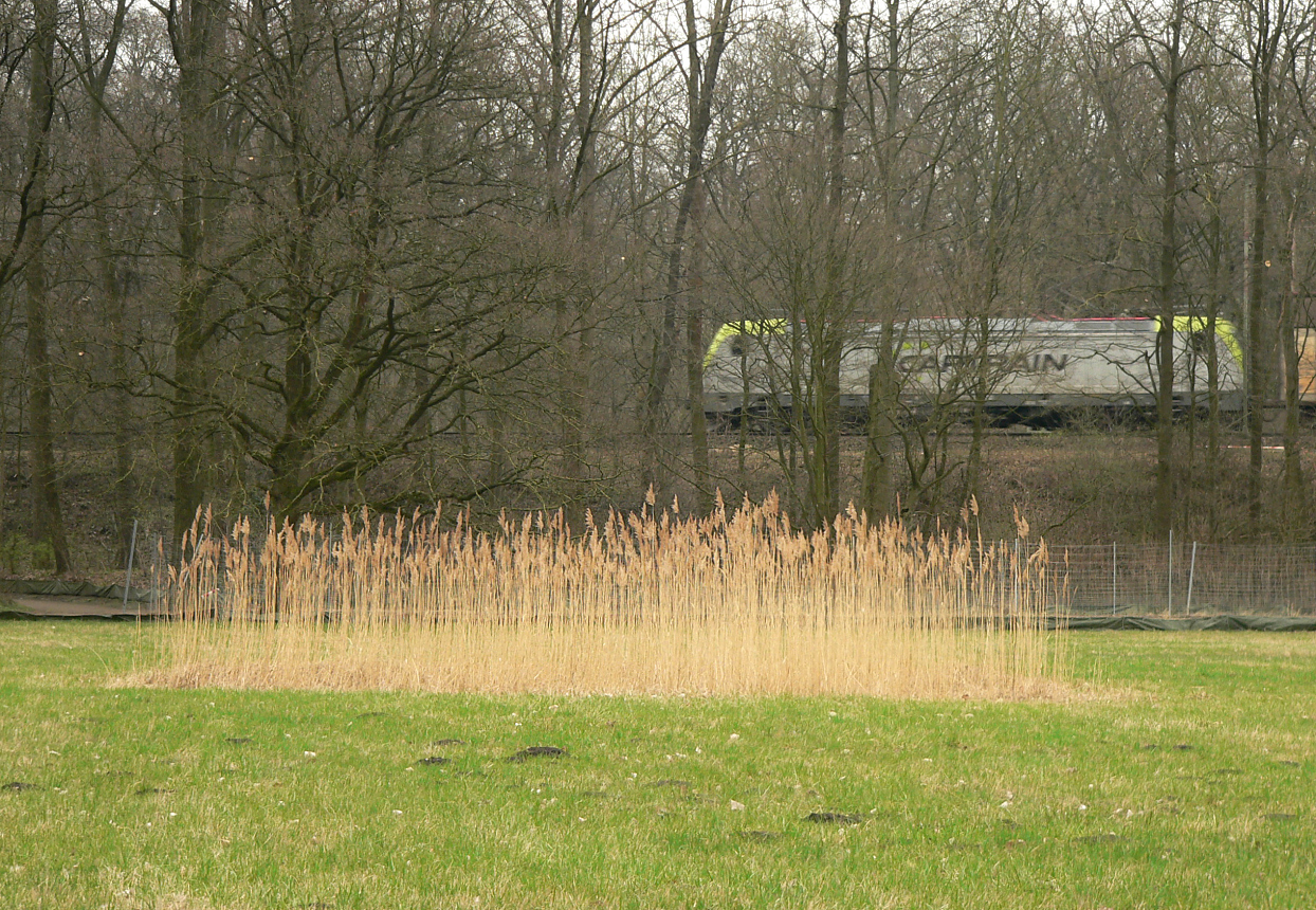 Bombentrichter im Hermann Löns Park in Hannover, im Hintergrund die Güterumgehungsbahn